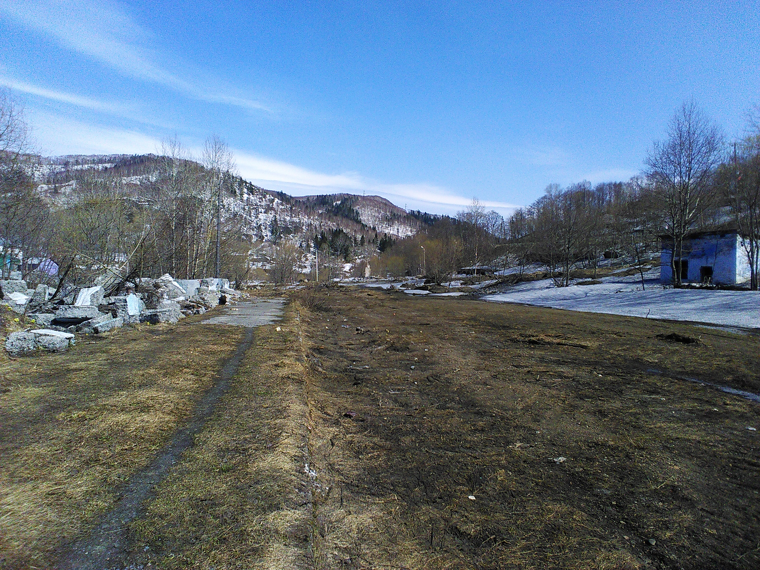 Вид в сторону Новоалександровска